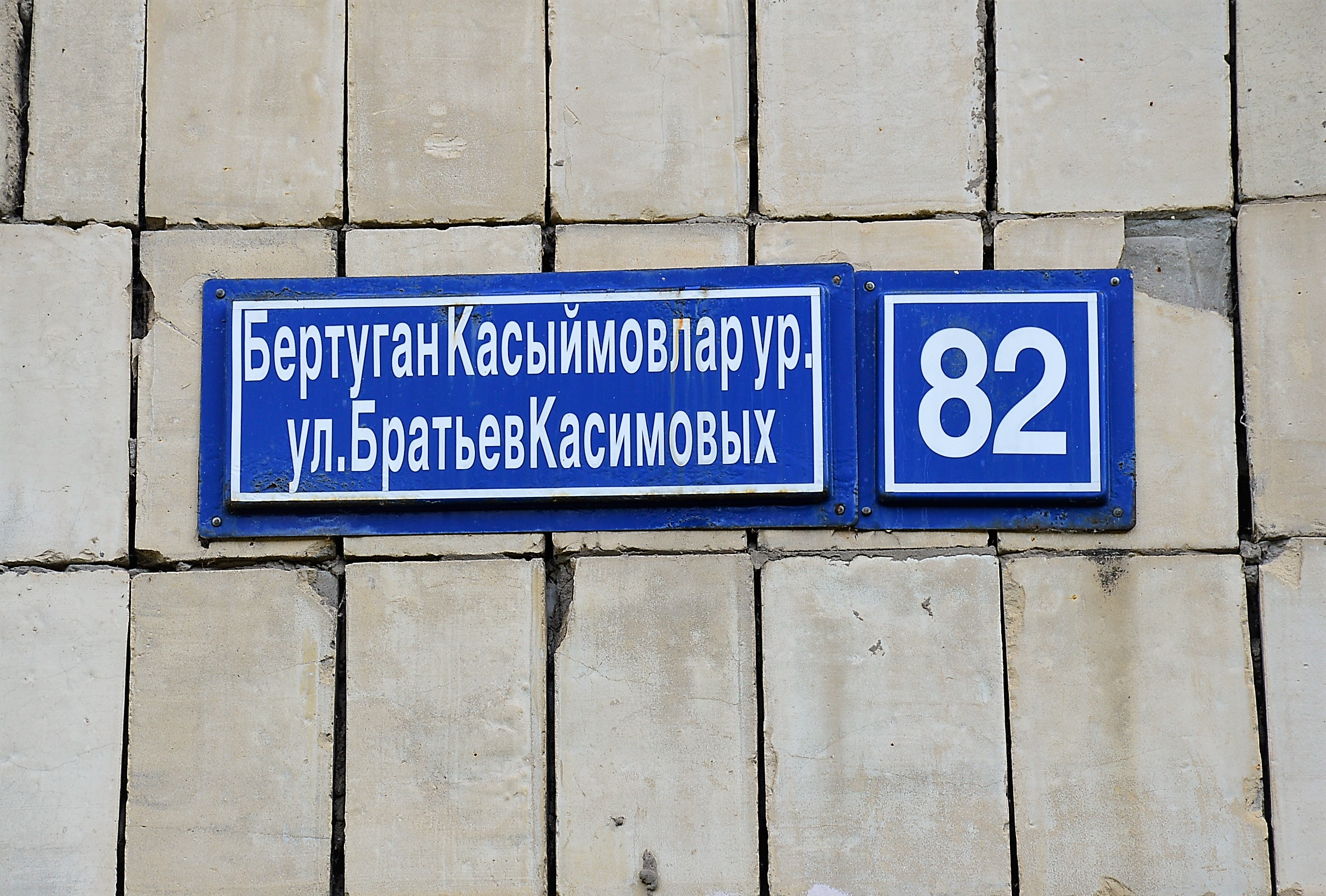 Казань, Горки. Табличка на доме: ул. Братьев Касимовых, 82